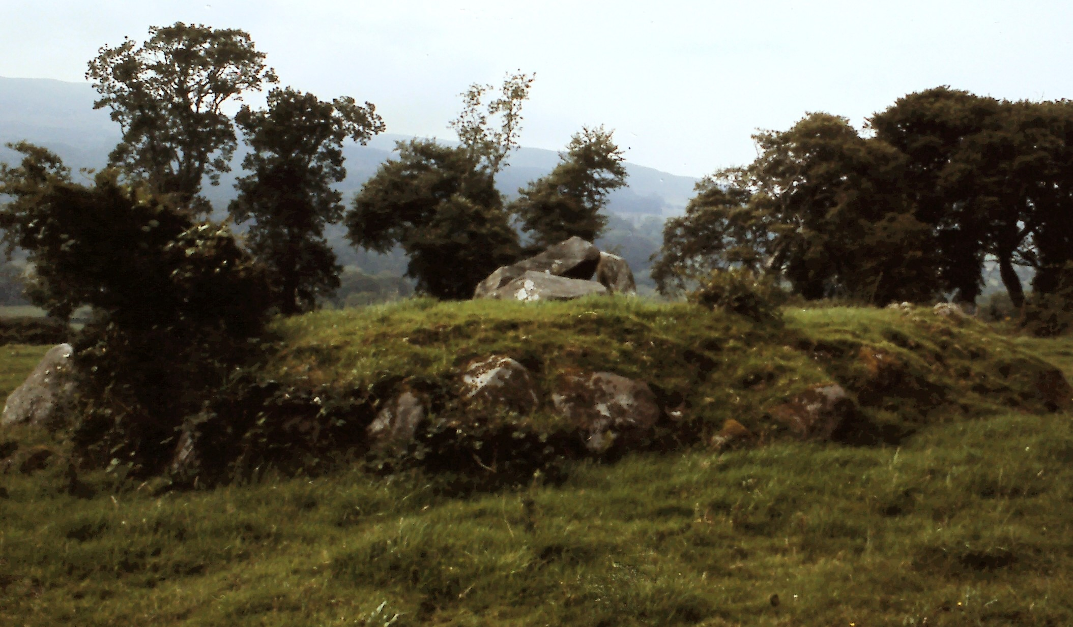 Clonlum